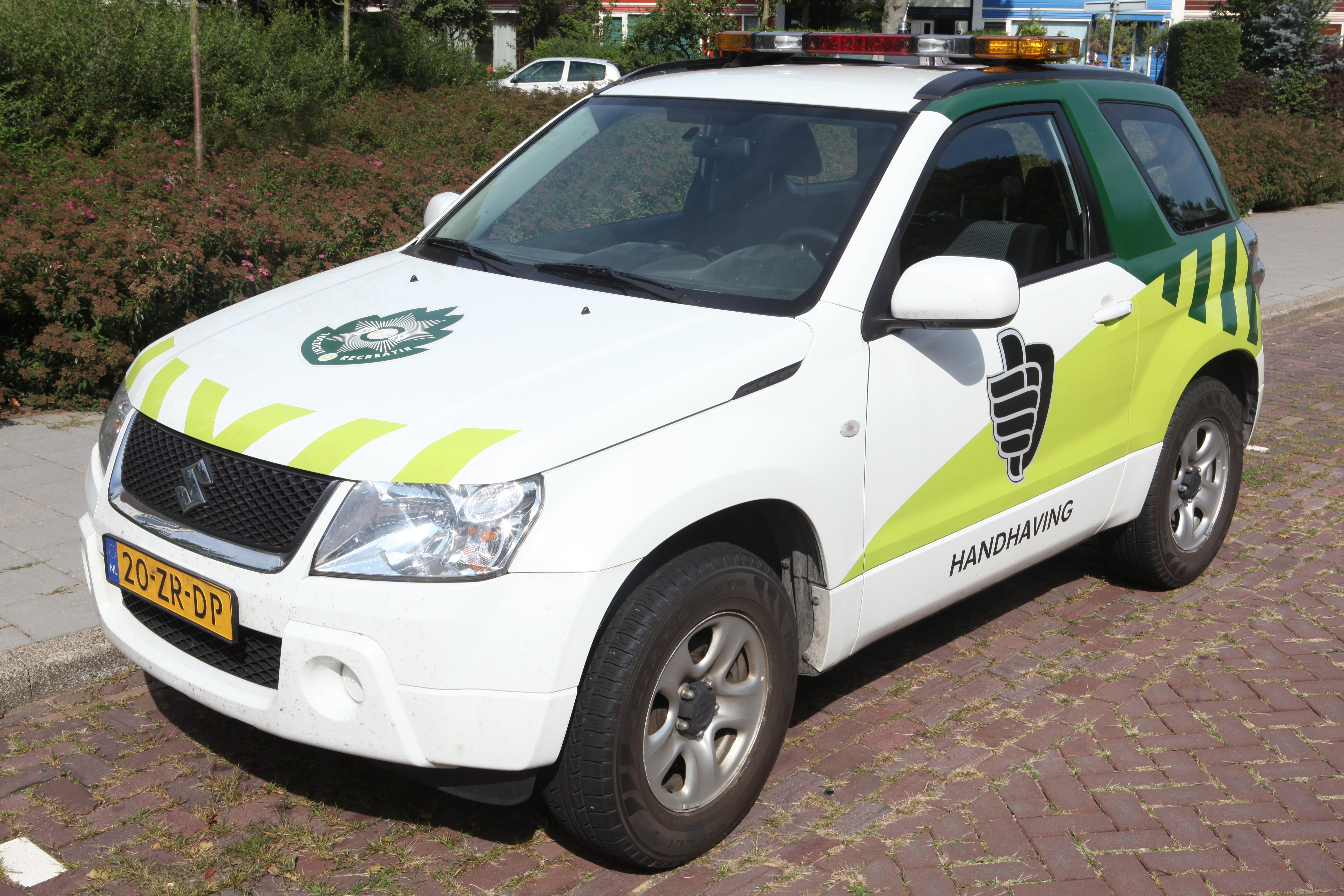 Suzuki Grand Vitara GZH Toezicht Recreatie Handhaving